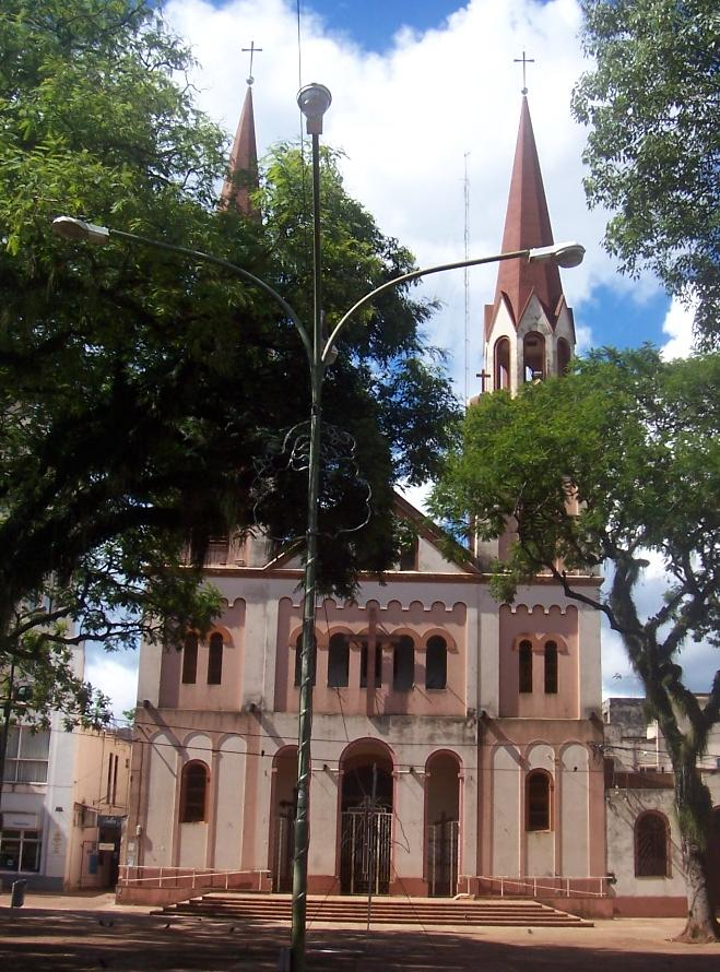 La Catedral de la ciudad de Posadas.